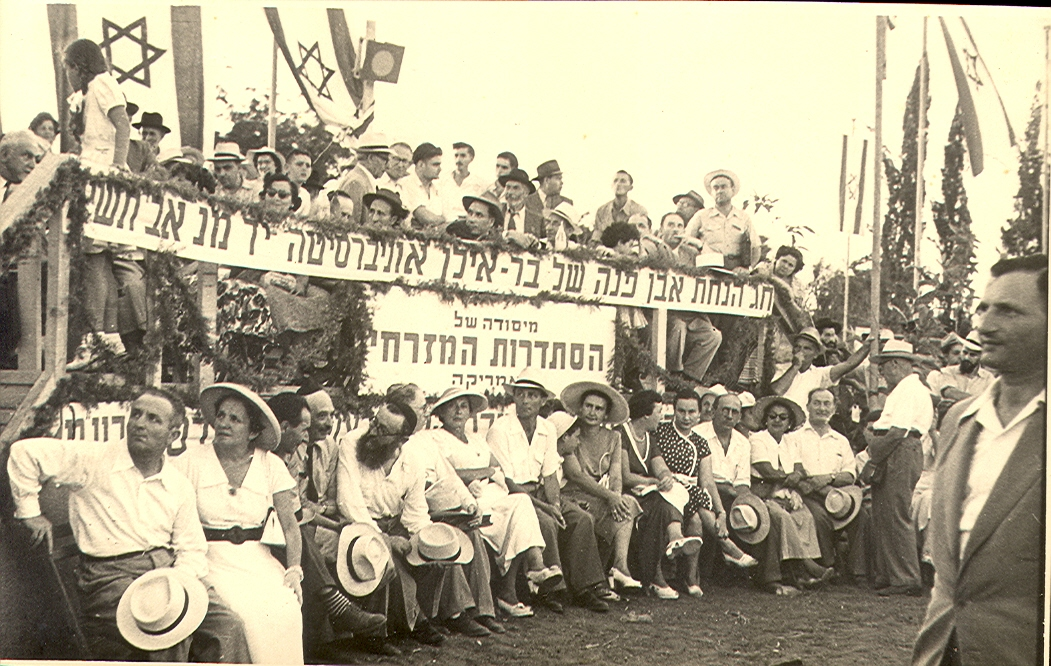 evenpina